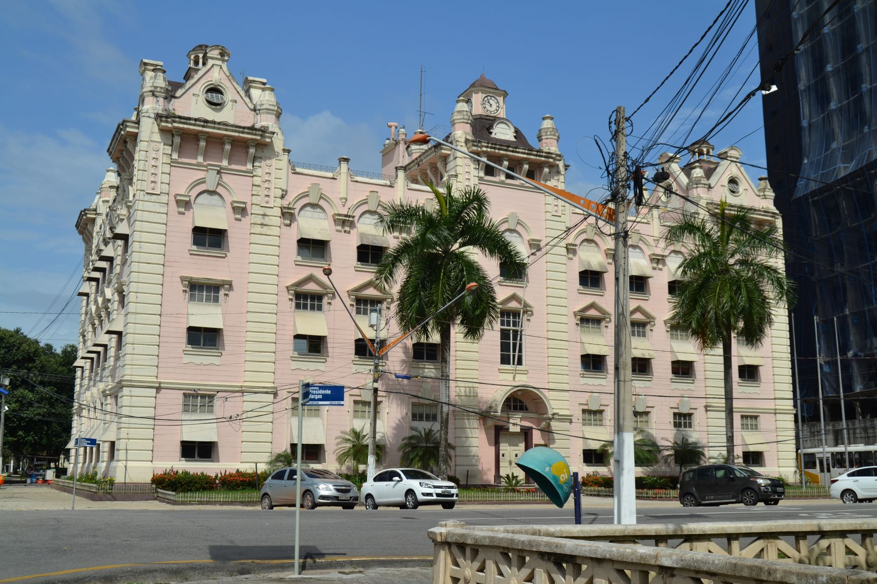 Sede da Companhia Docas do Pará, situado na Av. Pres. Vargas, nº 41, na cidade de Belém do Pará